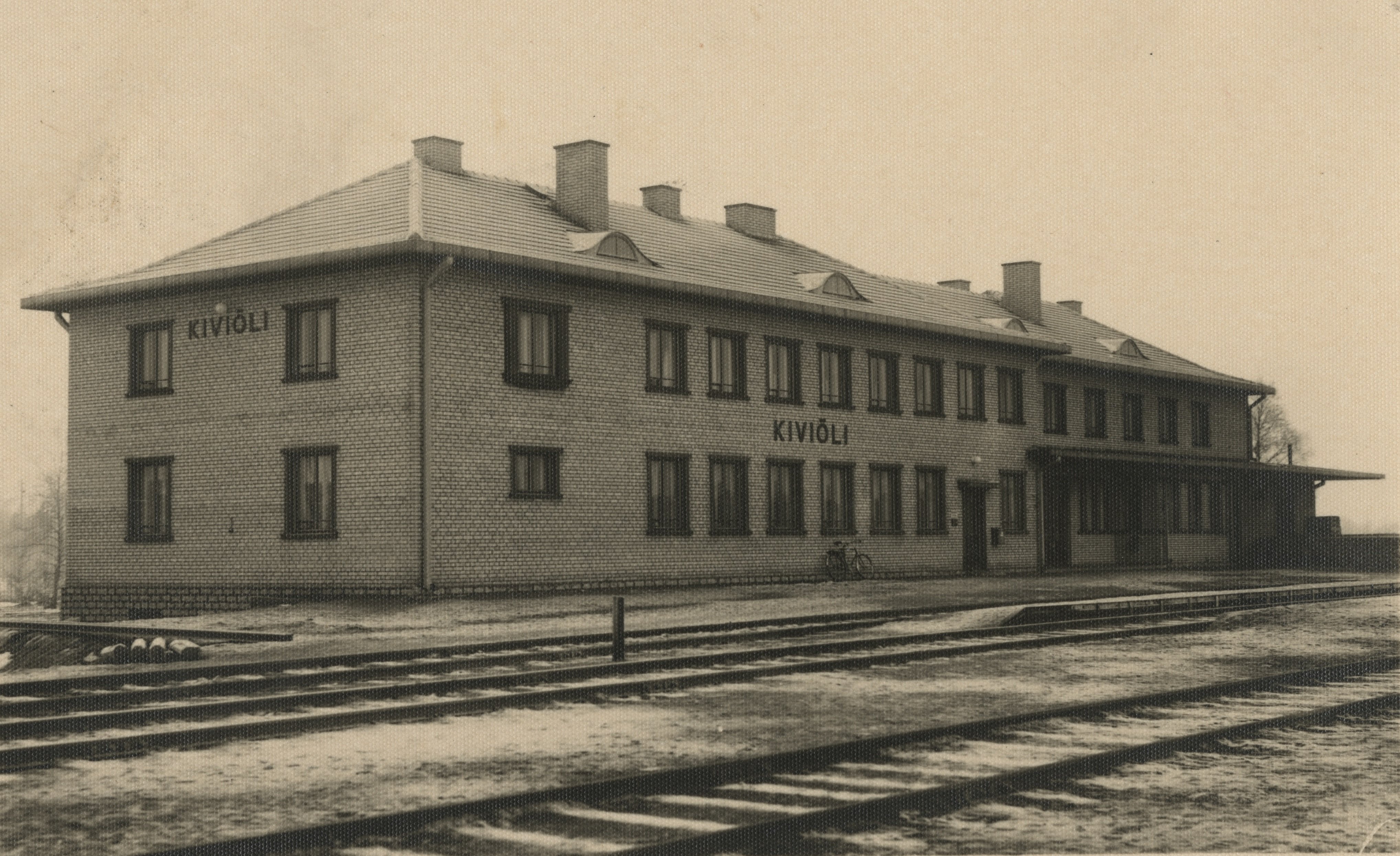 Kiviõli jaamahoone aastal 1938 This image on crowdsourcing geotagging platform Ajapaik